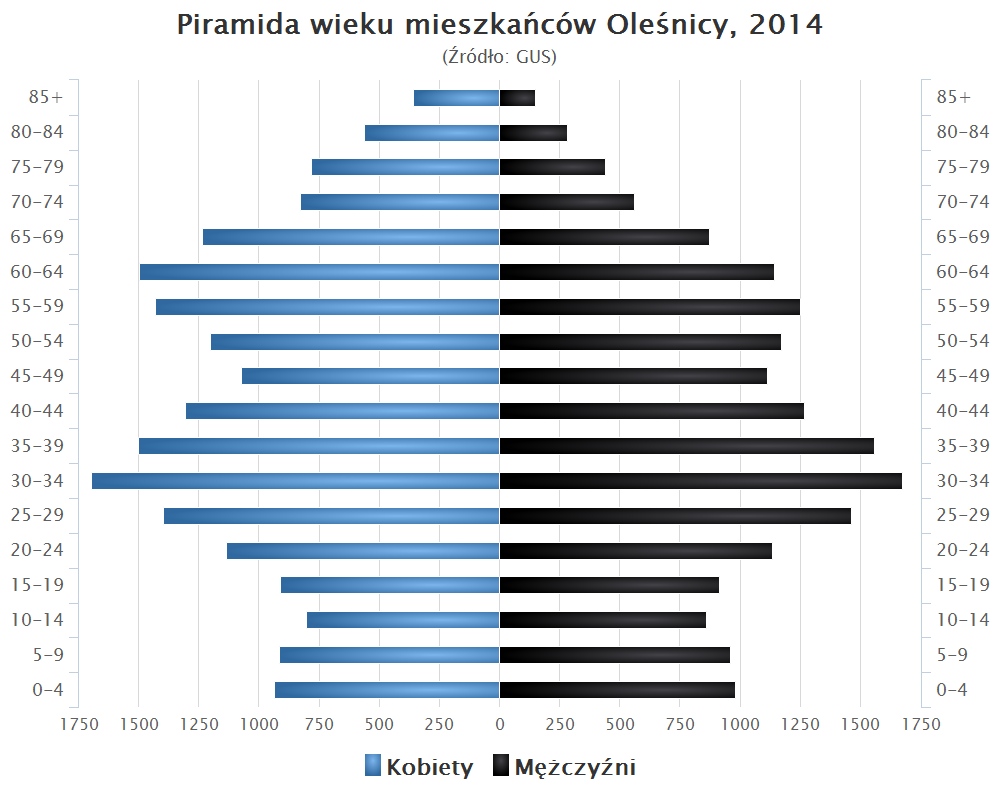 Piramida wieku mieszkańców Oleśnicy, 2014